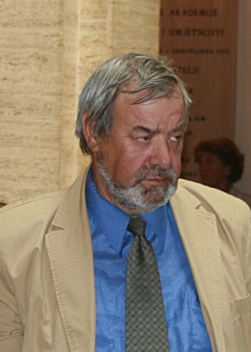 Jakša Fiamengo, svečano proglašenje i predstavljanje novih članova Hrvatske akademije znanosti i umjetnosti u Zagrebu